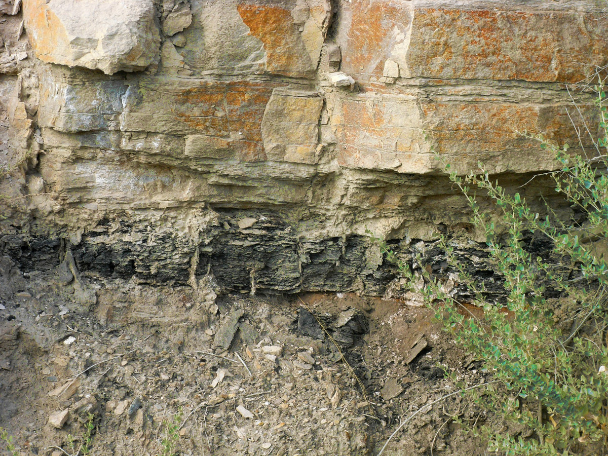 Curiositat natural. No abunden les vetes de carbó visibles des de l’exterior. Prop de Mequinensa, a l’altra banda del Segre